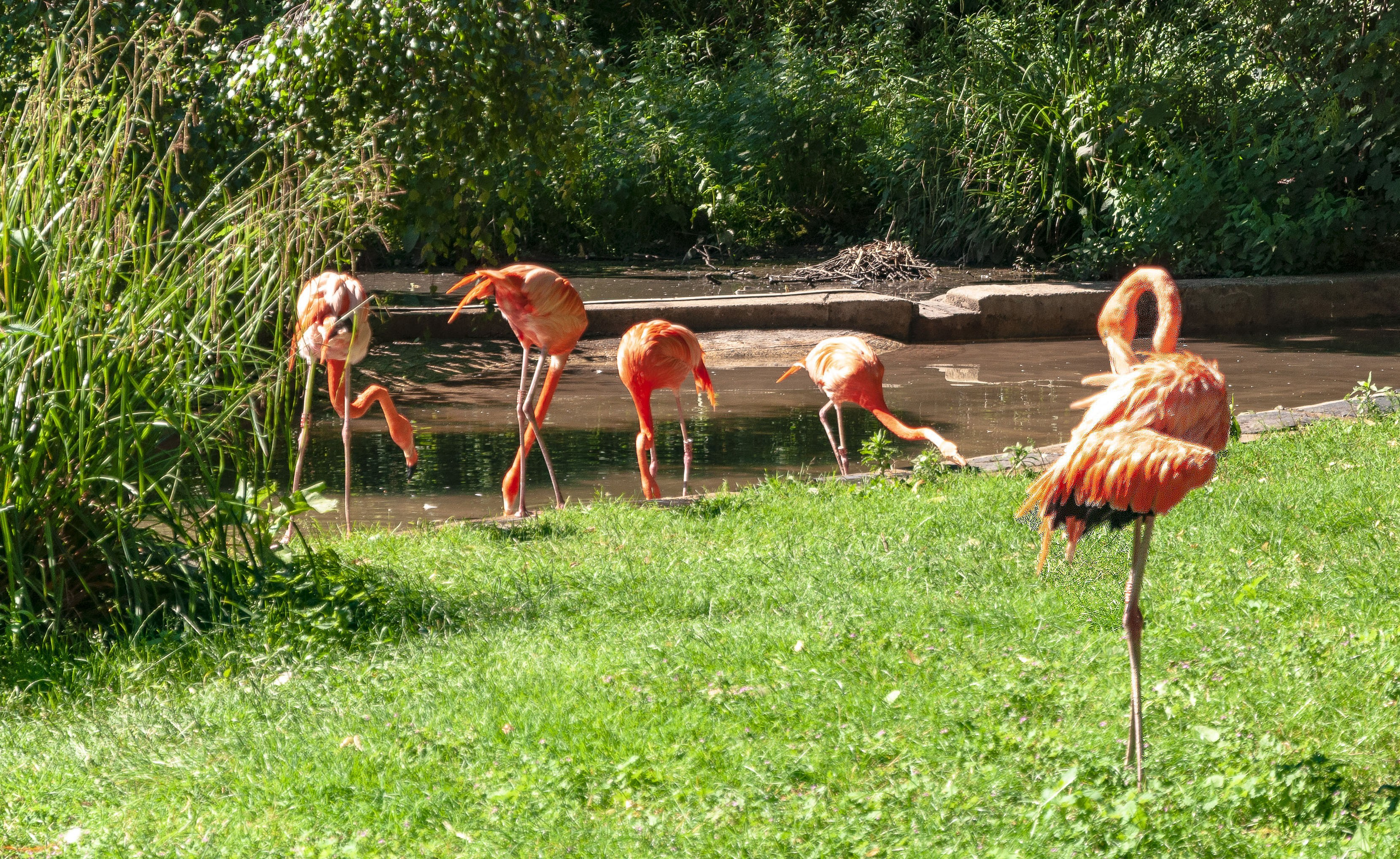 Flamants des Caraïbes du jardin des plantes de Paris.